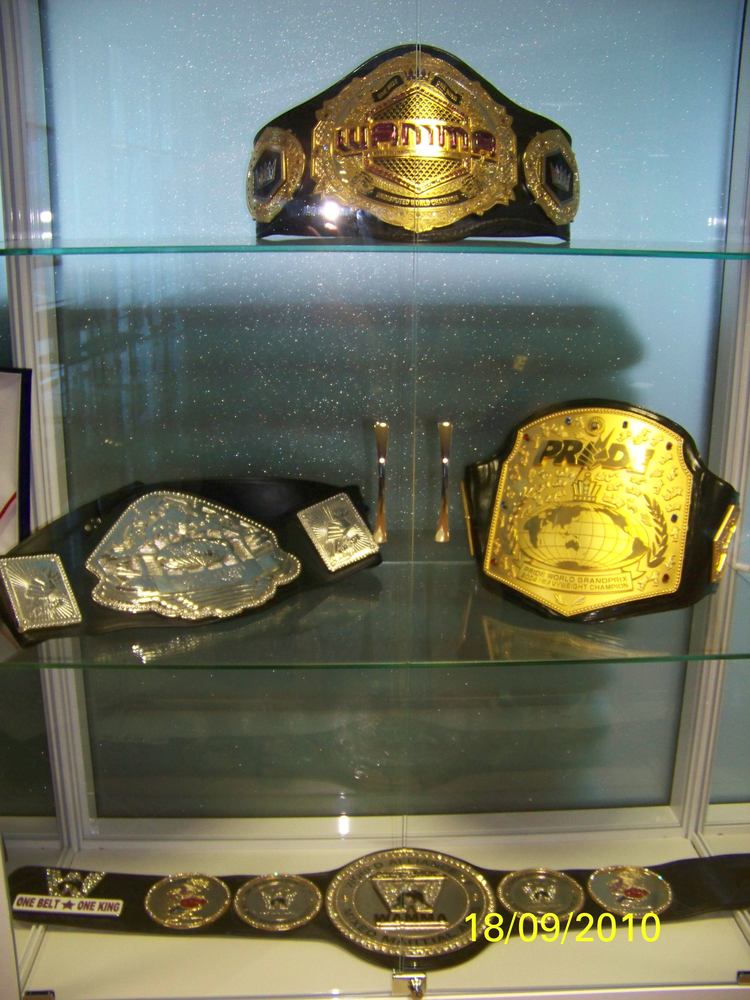 belt Fedor Emelianenko